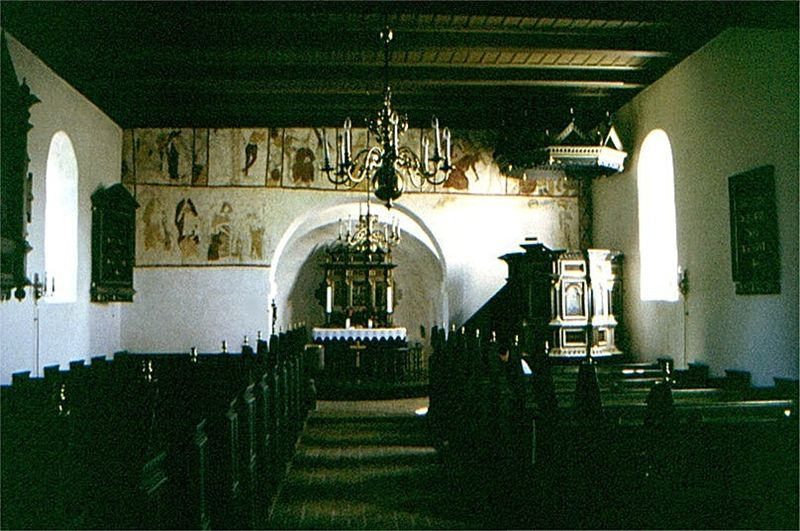 Hinge Kirke, kirkerummet set mod øst; Silkeborg Kommune, Denmark